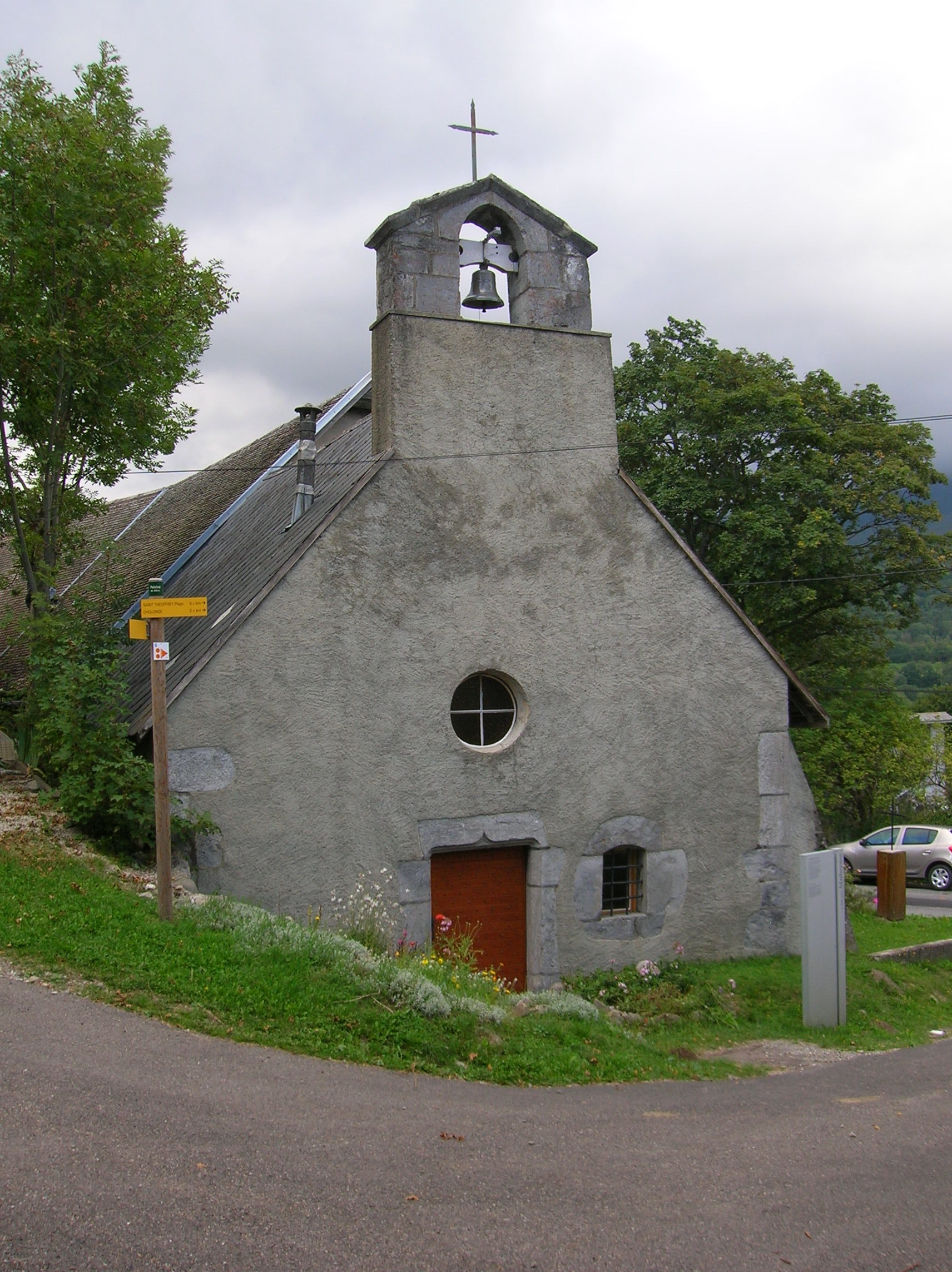 Chapelle de Petichet, Saint-Théoffrey, Isère, Rhône-Alpes, France.